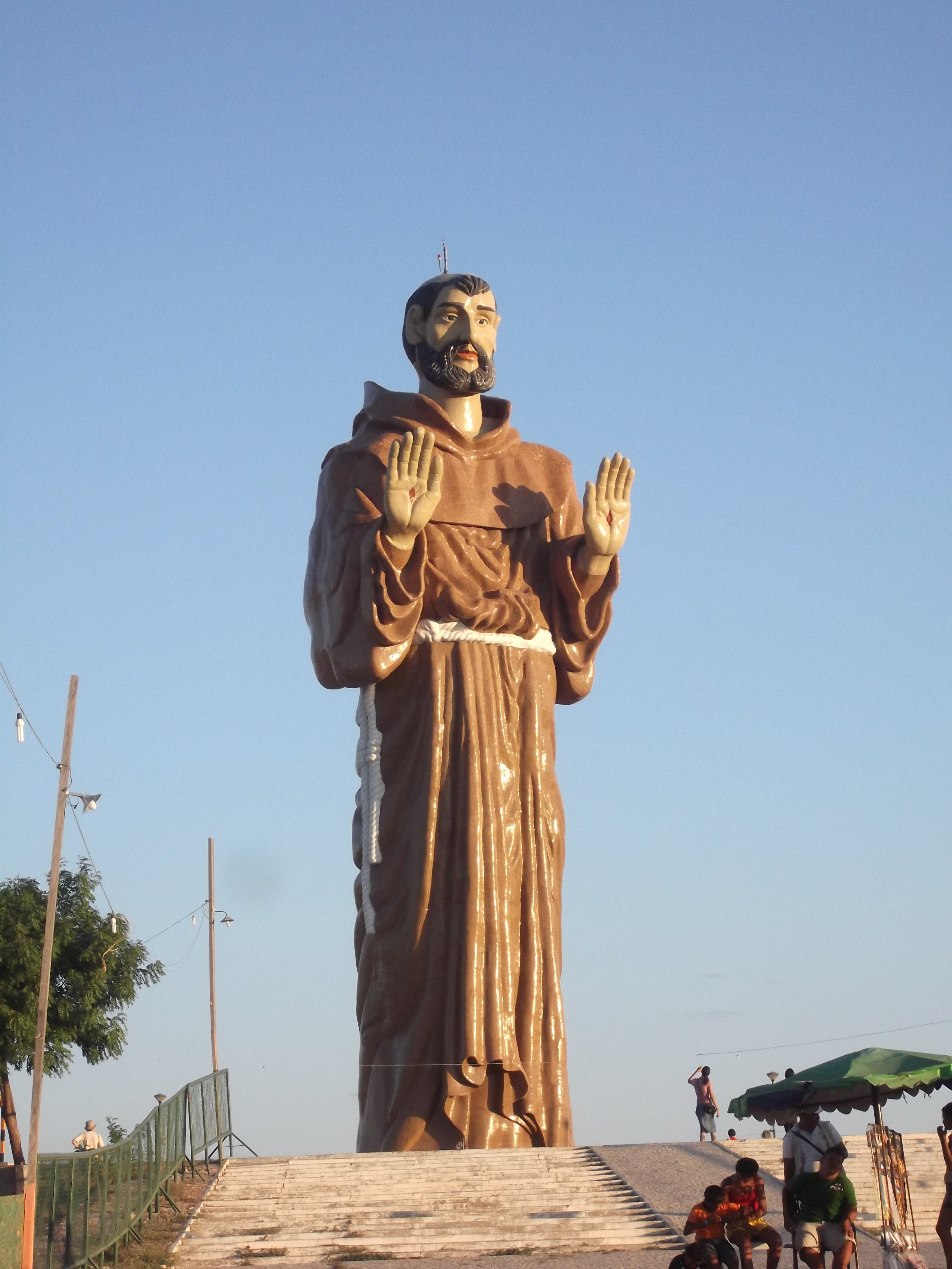 Estátua Gigante de São Francisco, Canindé, Ceará, Brasil